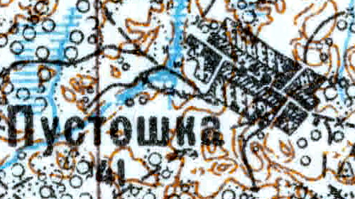 Топографическая карта Ленинградской области, квадрат VIc-28 (Луга), деревня Пустошка